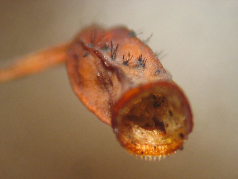 Haartragendes Frauenhaarmoos Polytrichum piliferum, Kapsel des Sporogons, etwa 32x vergrößert, Rostock